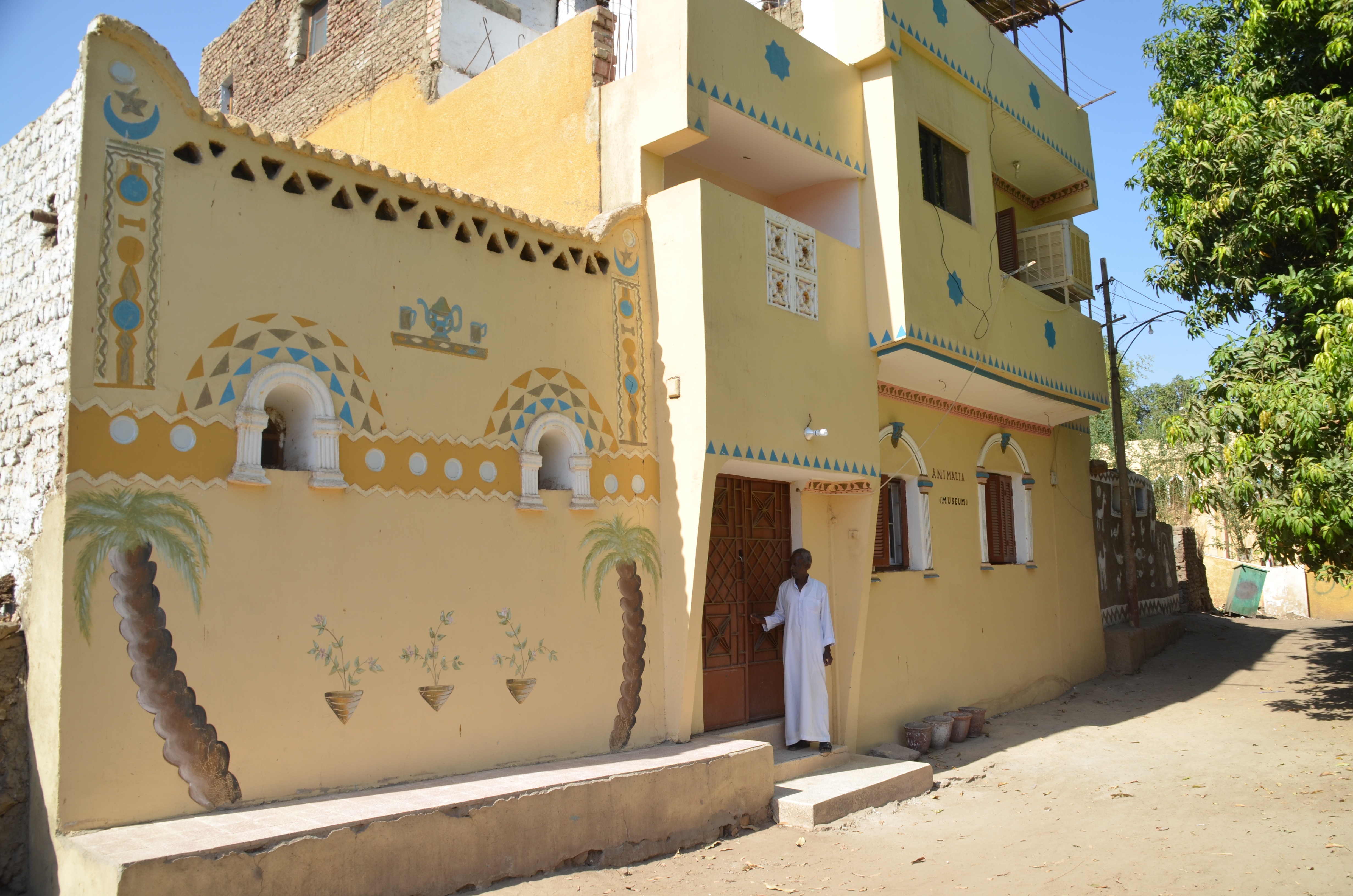 متحف انيماليا في جزيرة الفنتين في اسوان يعرض التراث النوبي وبعض الحيوانات المحنطة التي تعيش في المنطقة